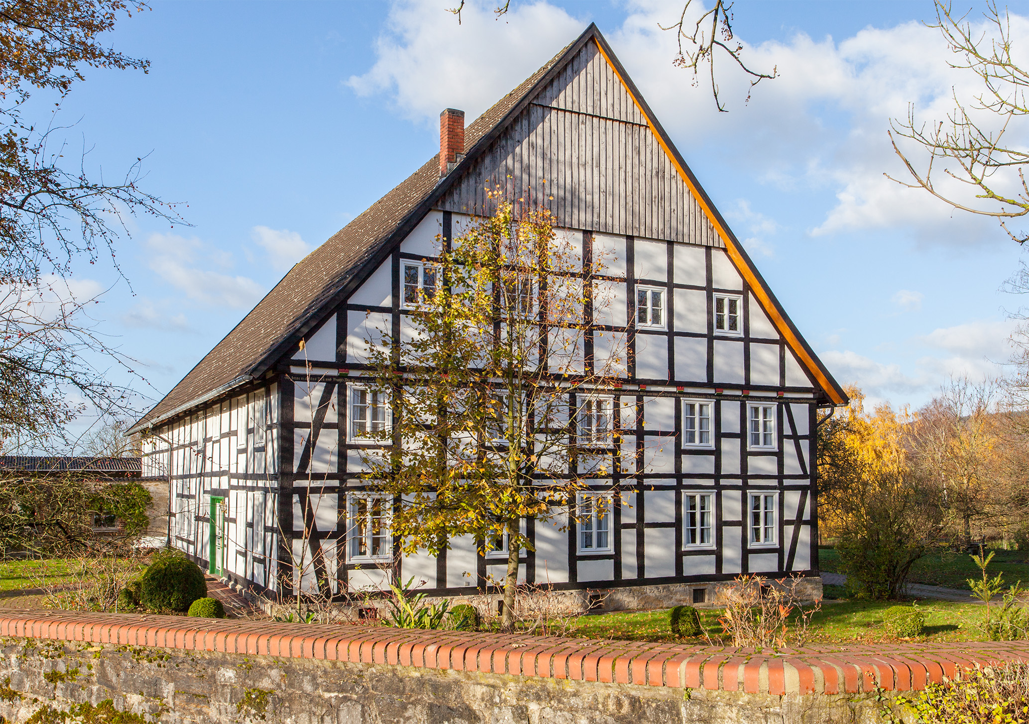 Brosen (Kalletal), Lindenweg 14 This is a photograph of an architectural monument.